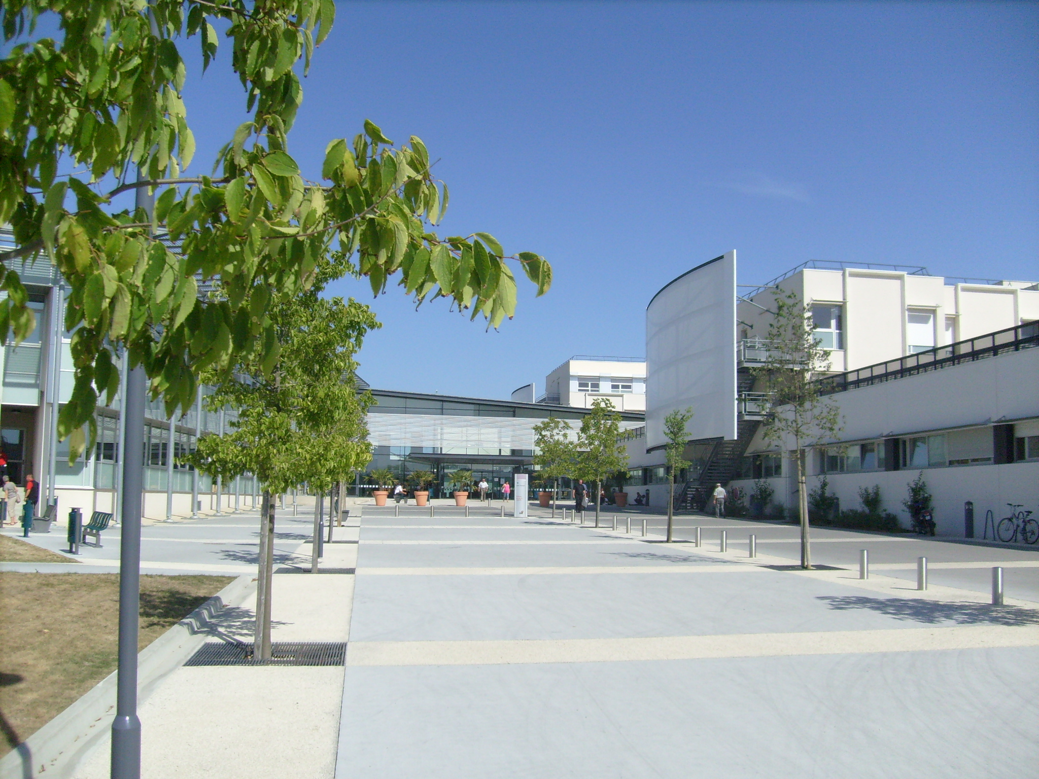 Le CHS (Centre hospitalier de Saintonge) à Saintes. Esplanade devant le hall principal.